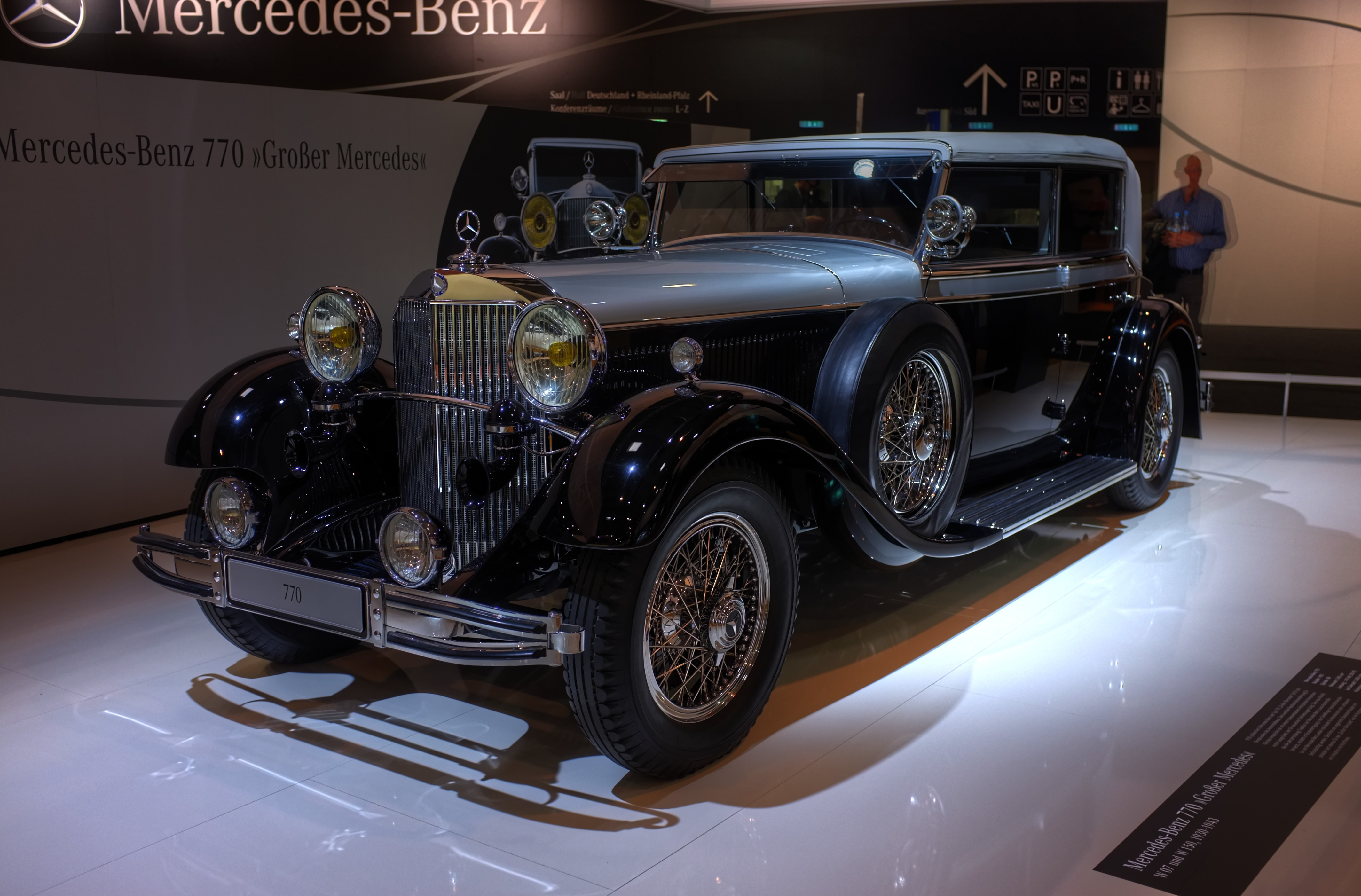 Techno Classica 2013